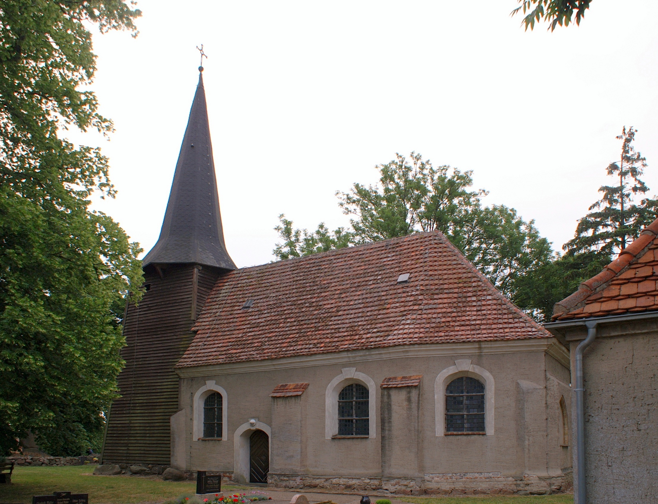 Kirche in Dennin, Ansicht von Südosten